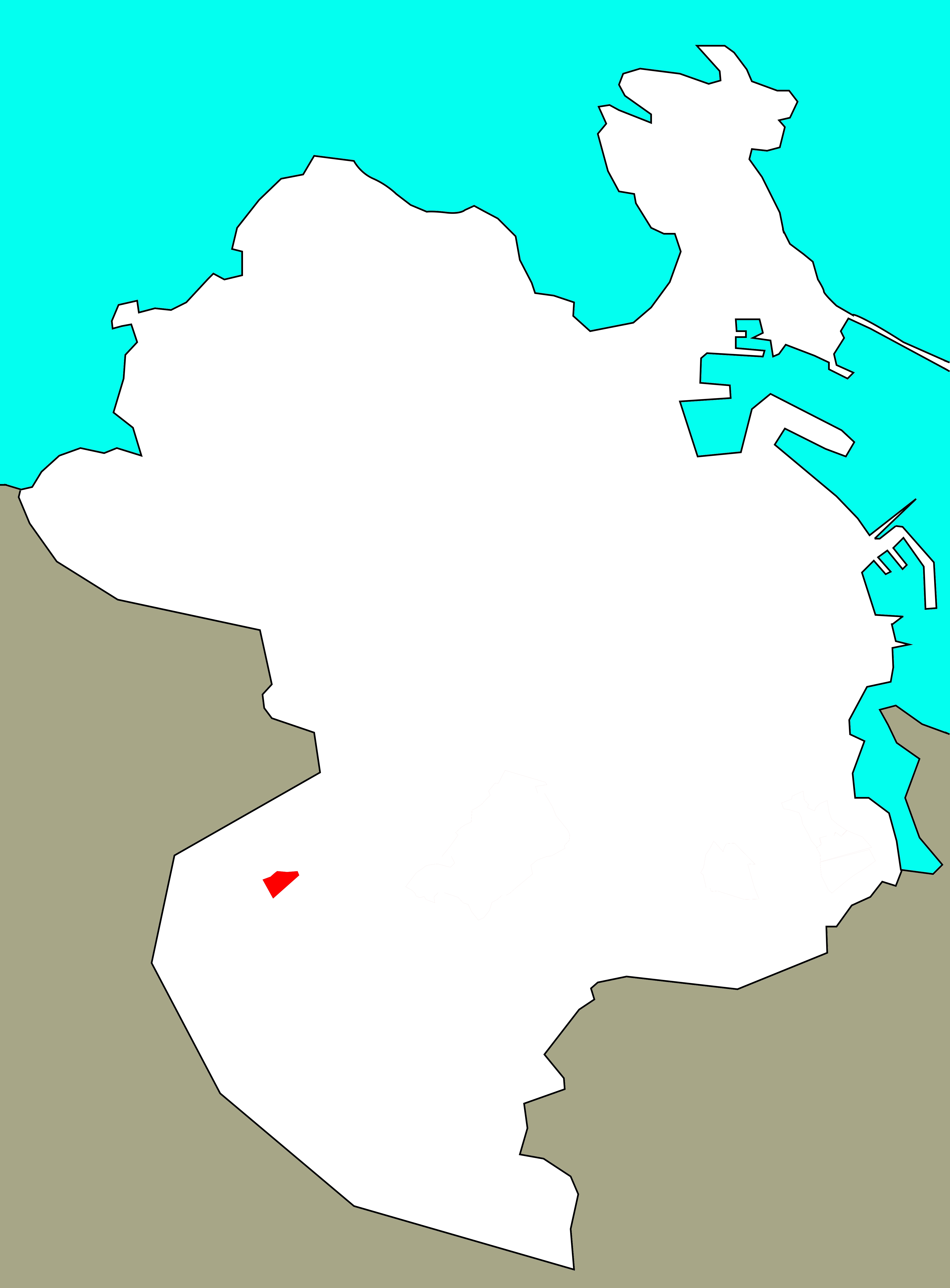 Situación de Vío no concello da Coruña, segundo